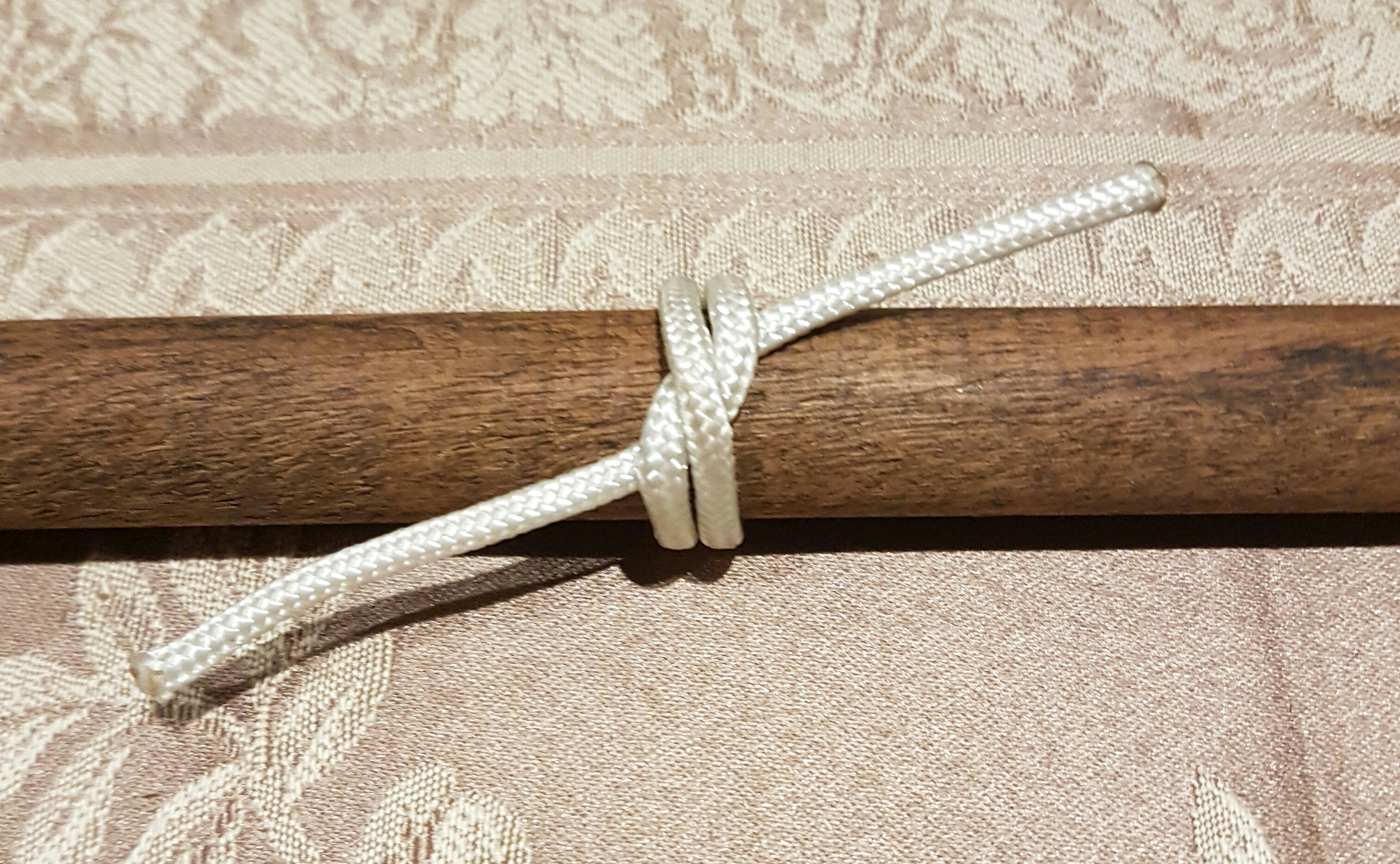 Foto van 'n wurgknoop (Strangle knot).